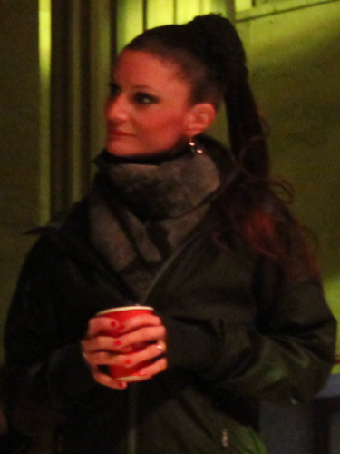 Jehan Barbur, 15 Ekim 2011'de Bilkent Müzik Festivali'nde konser verir iken. Orijinal fotoğraf (kendi çekimim)